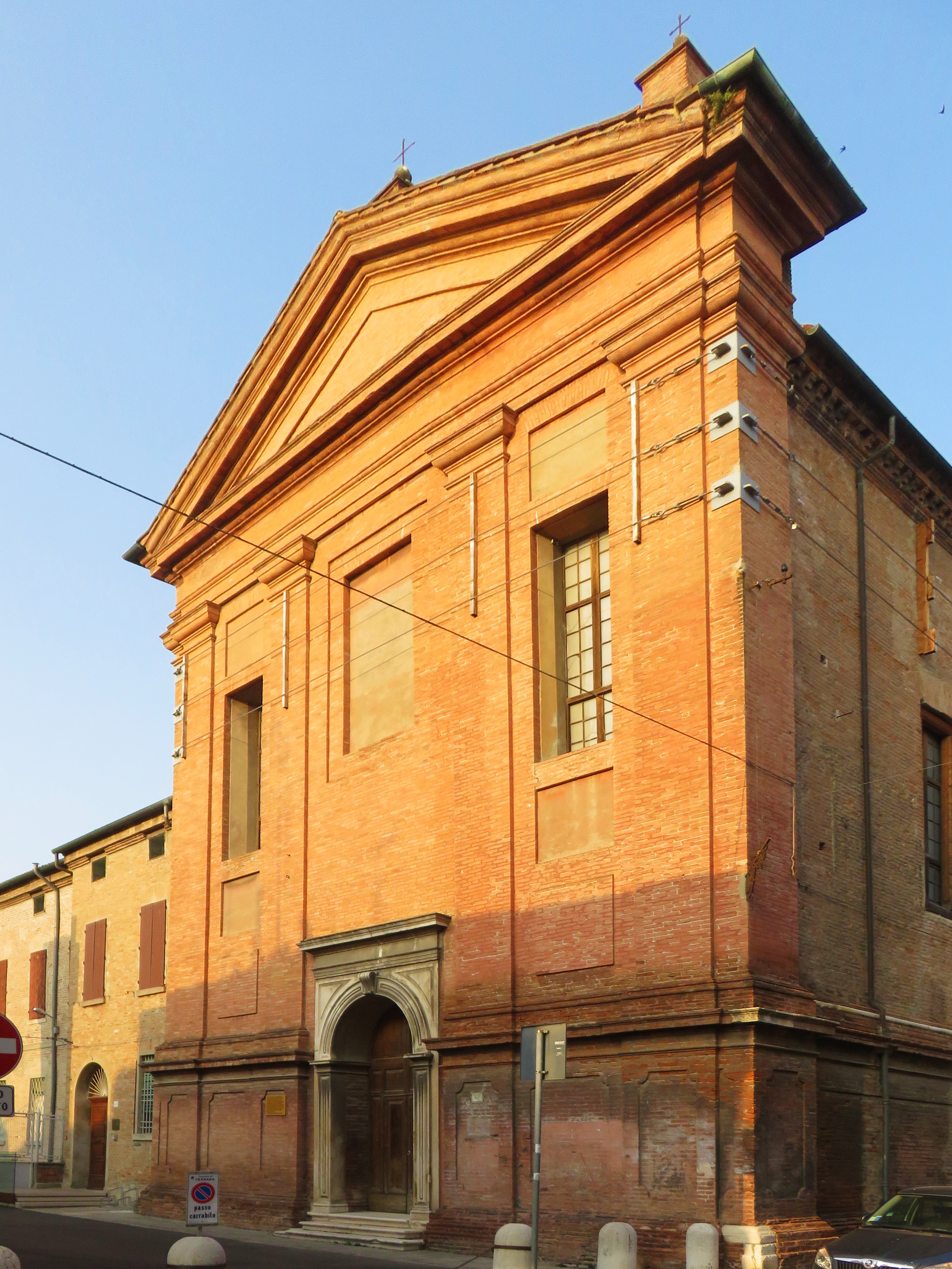 Antica via di Ferrara appartenente ai primi insediamenti urbani